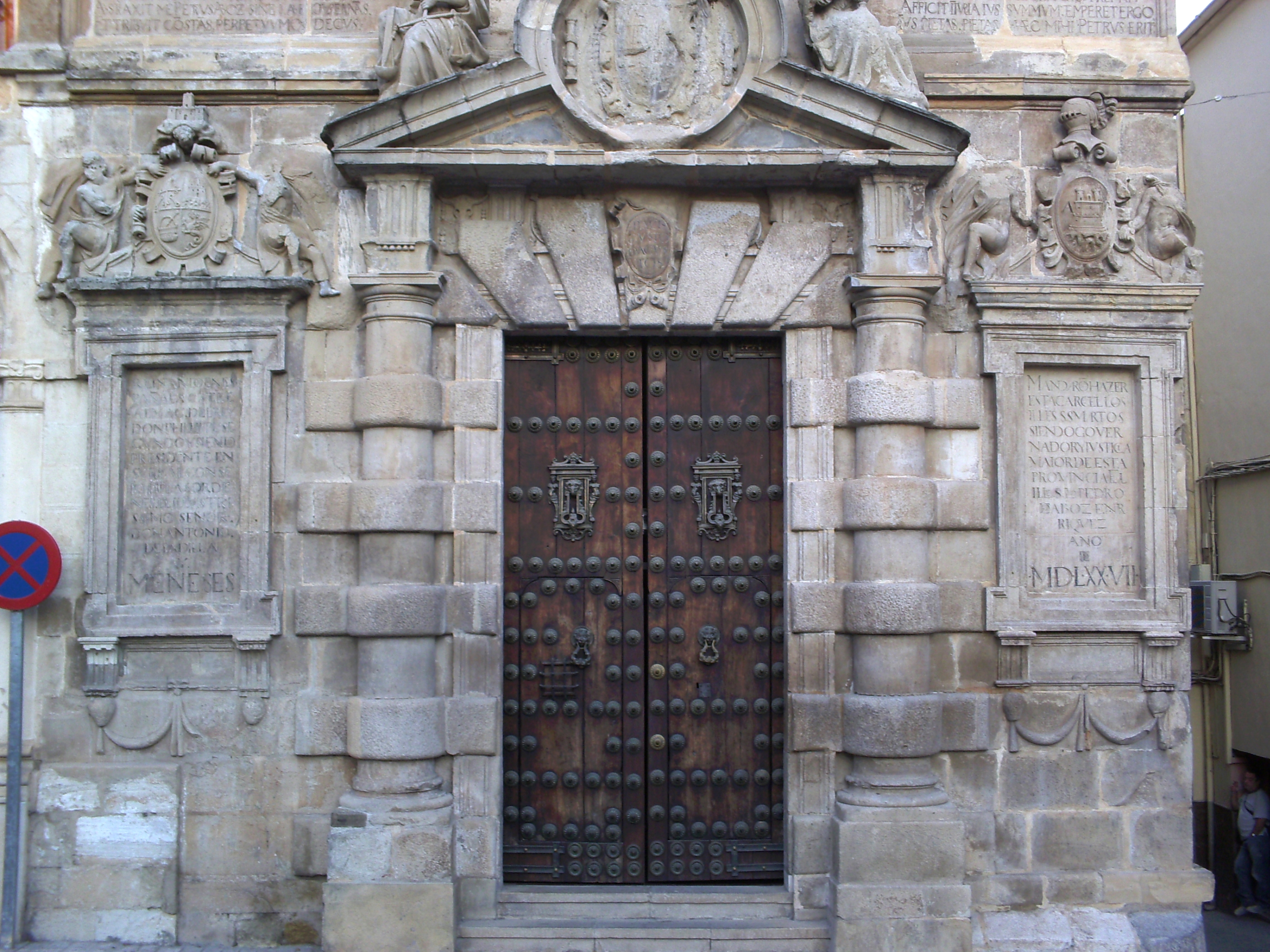 Fachada del Ayuntamiento de Martos.